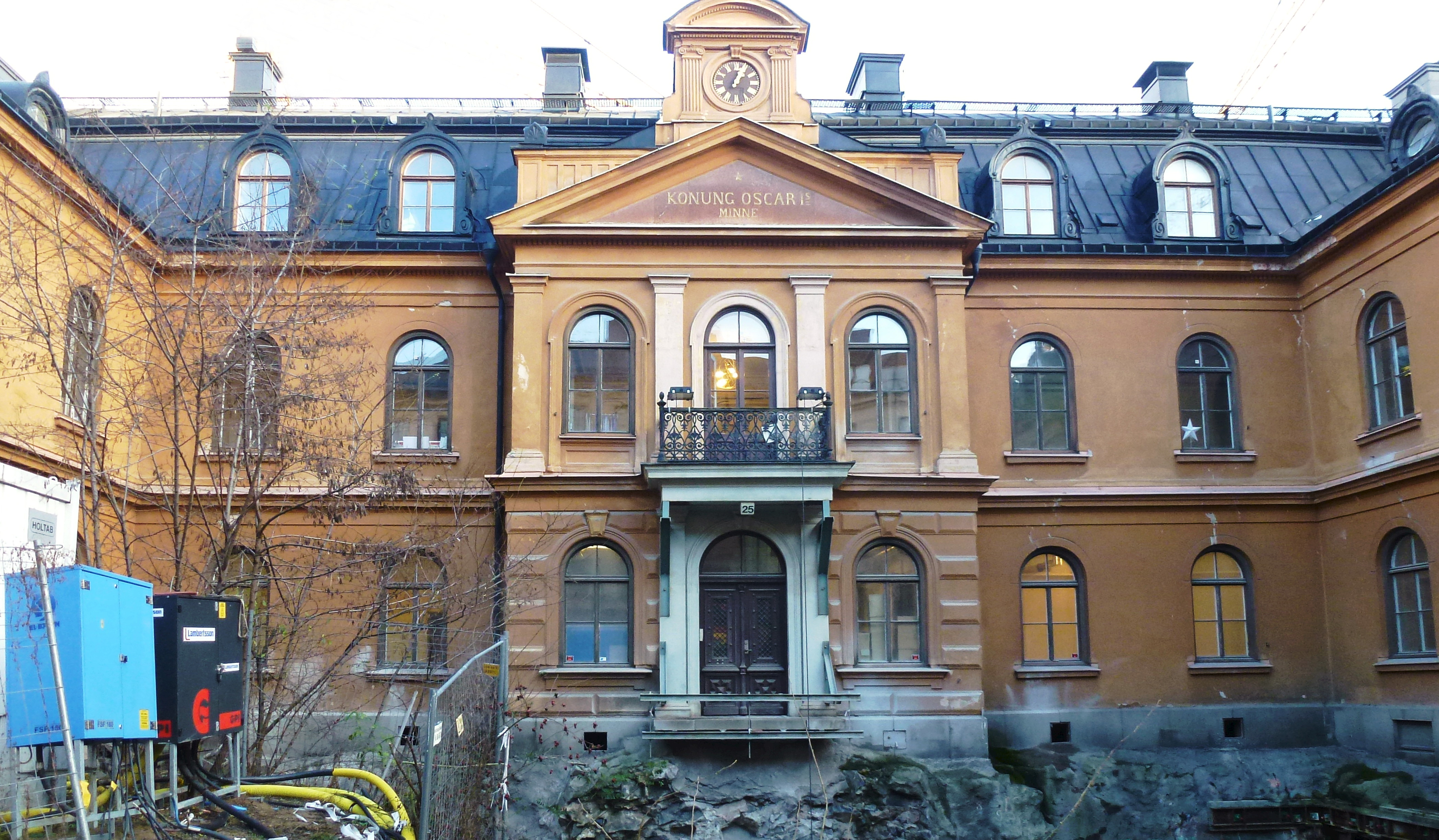 Konung Oscar I:s Minne, huvudfasad mot Björngårdsgatan